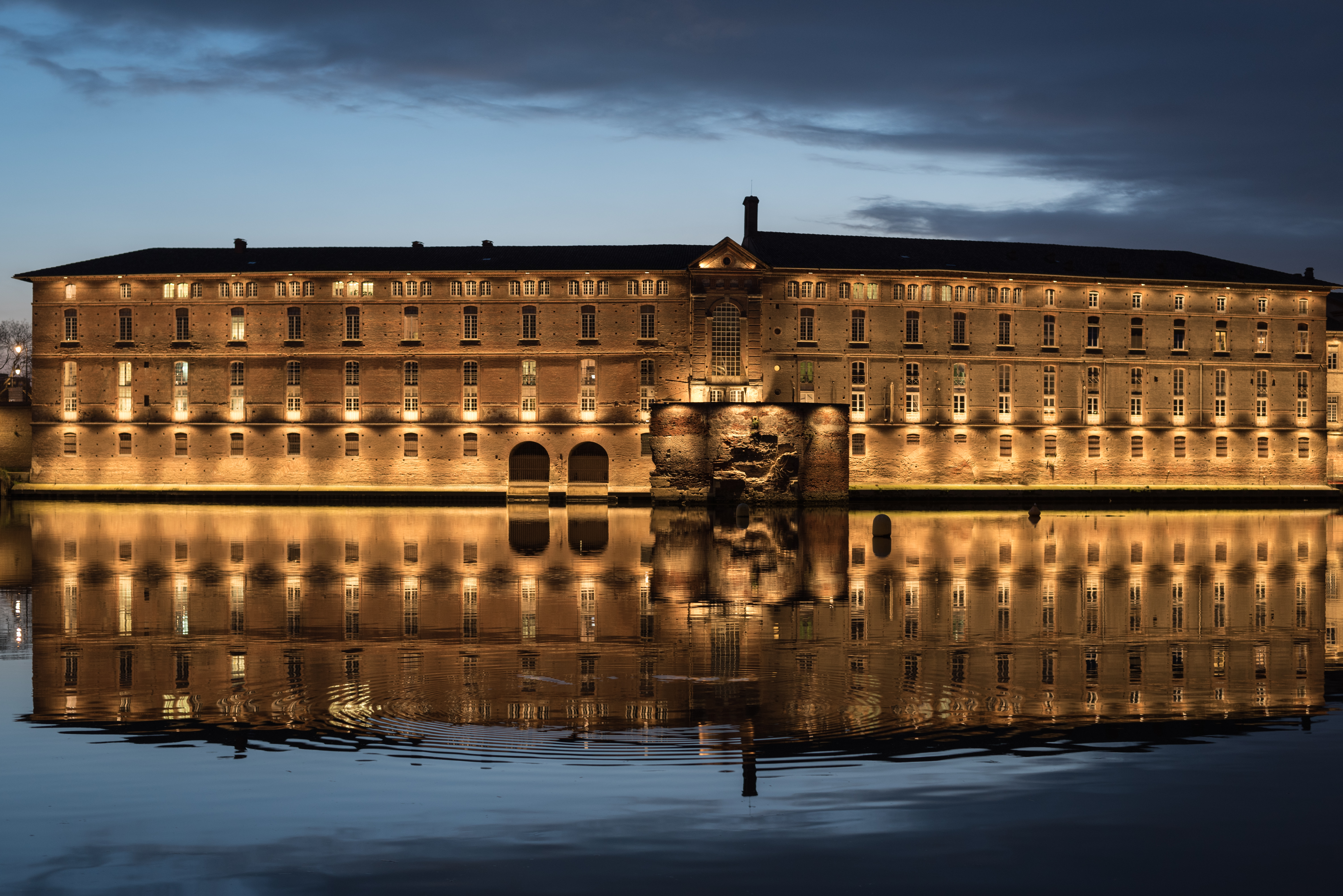 Façade de l'Hôtel-Dieu Saint-Jacques à Toulouse, et ses reflets dans la Garonne